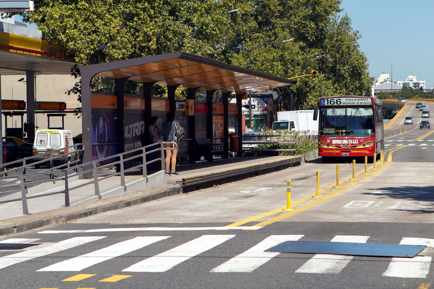 Buenos Aires